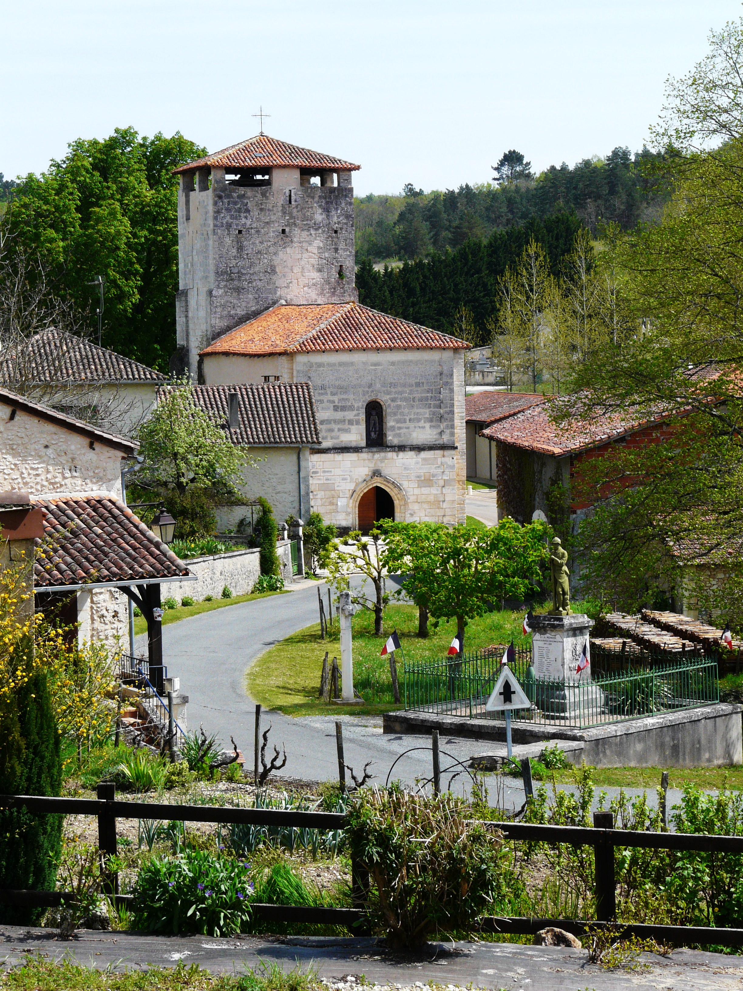 Vue générale de Bussac, Dordogne, France